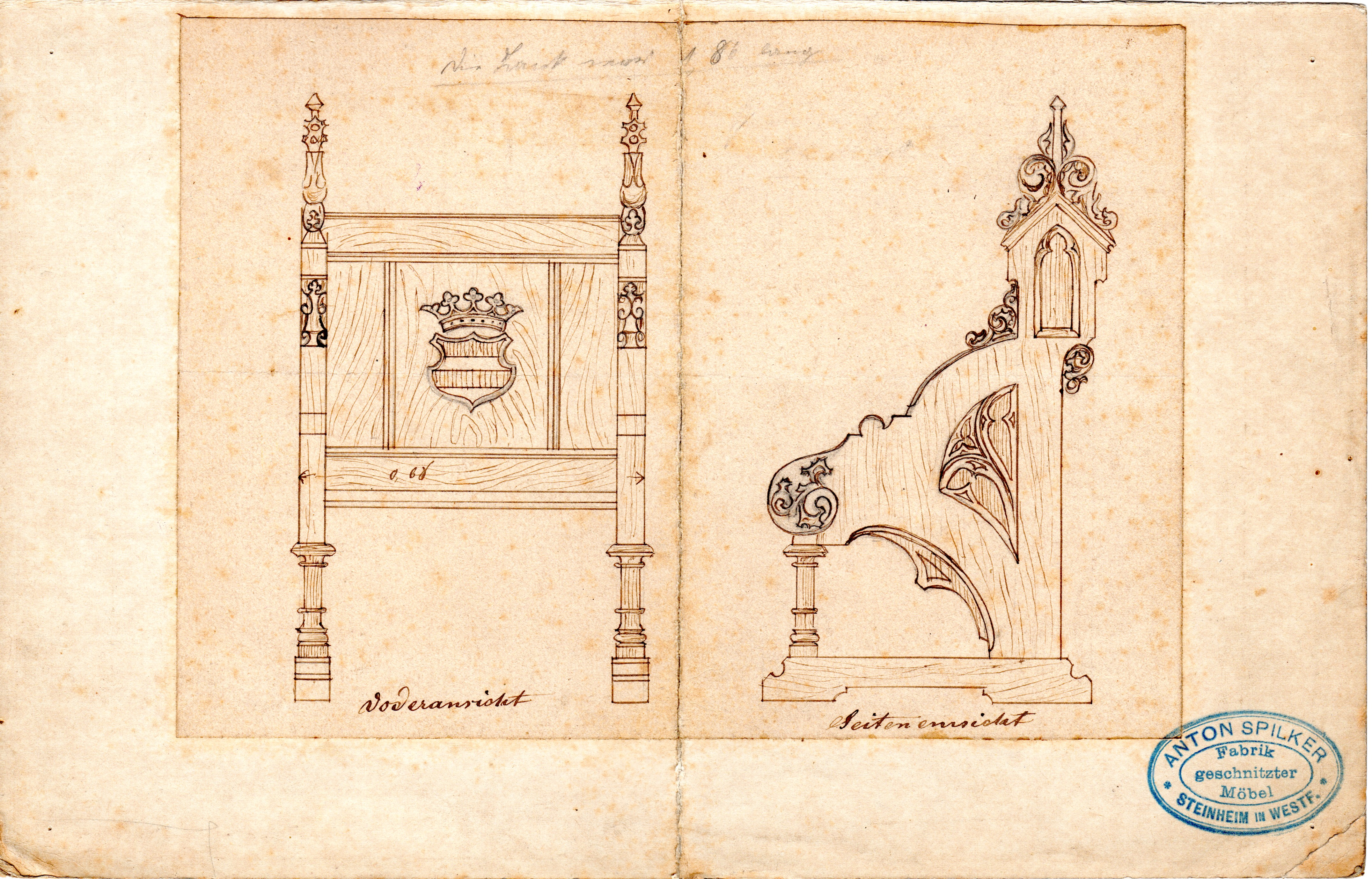 Zeichnung von Wangenstuhl in Neo-Gotik aus Angebotsbuch der Firma Anton Spilker „Fabrik geschnitzter Möbel", Steinheim/Westf. ca. 1870